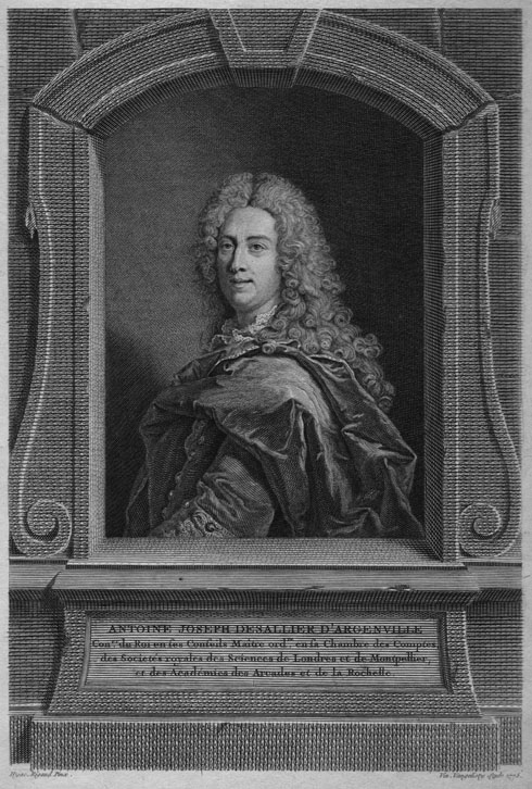 Portrait of Antoine Joseph Dezallier d'Argenville (1680-1765)